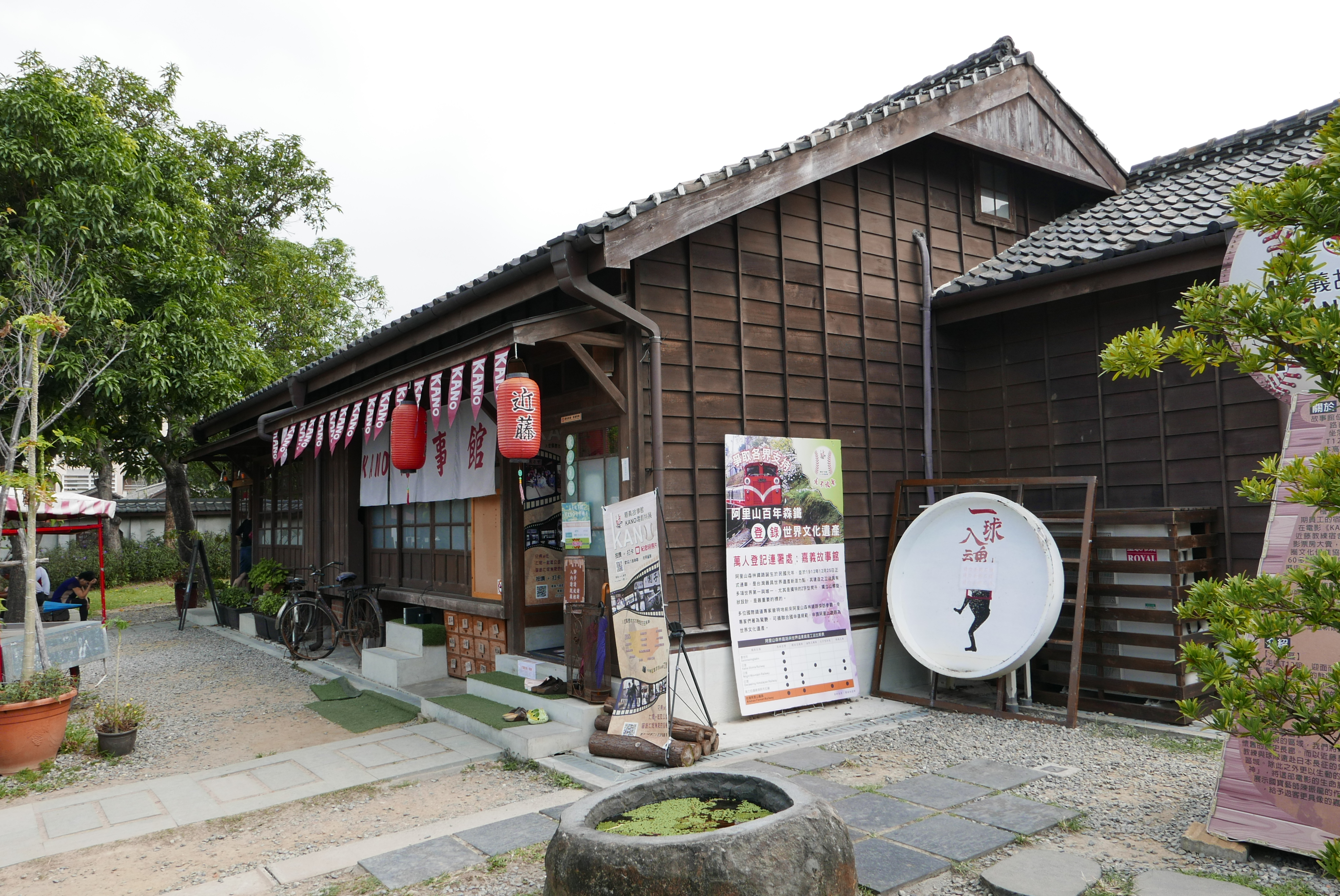 嘉義市 檜意森活村 KANO故事館